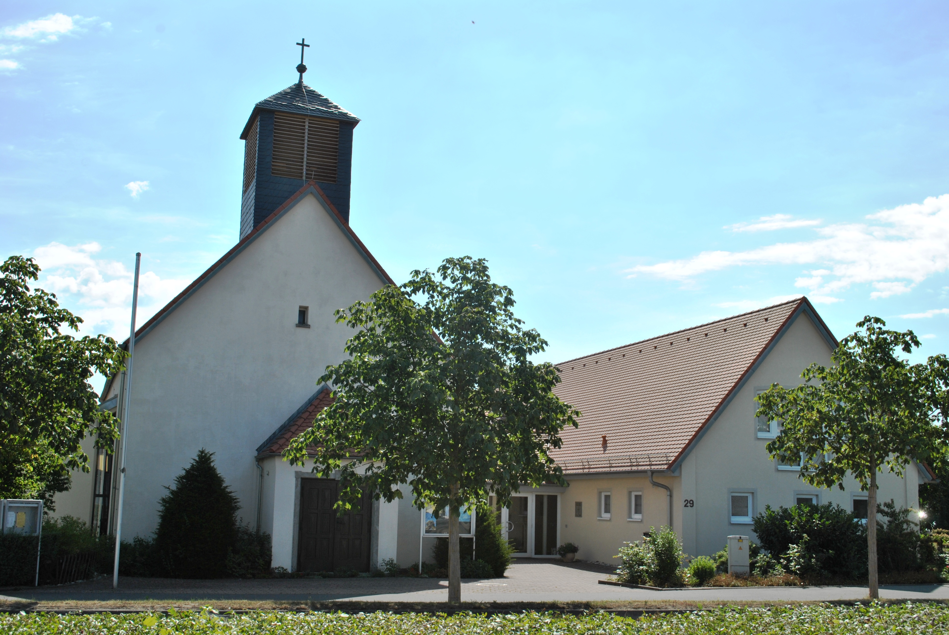 Evangelisch-lutherische Gnadenkirche in Wiesentheid